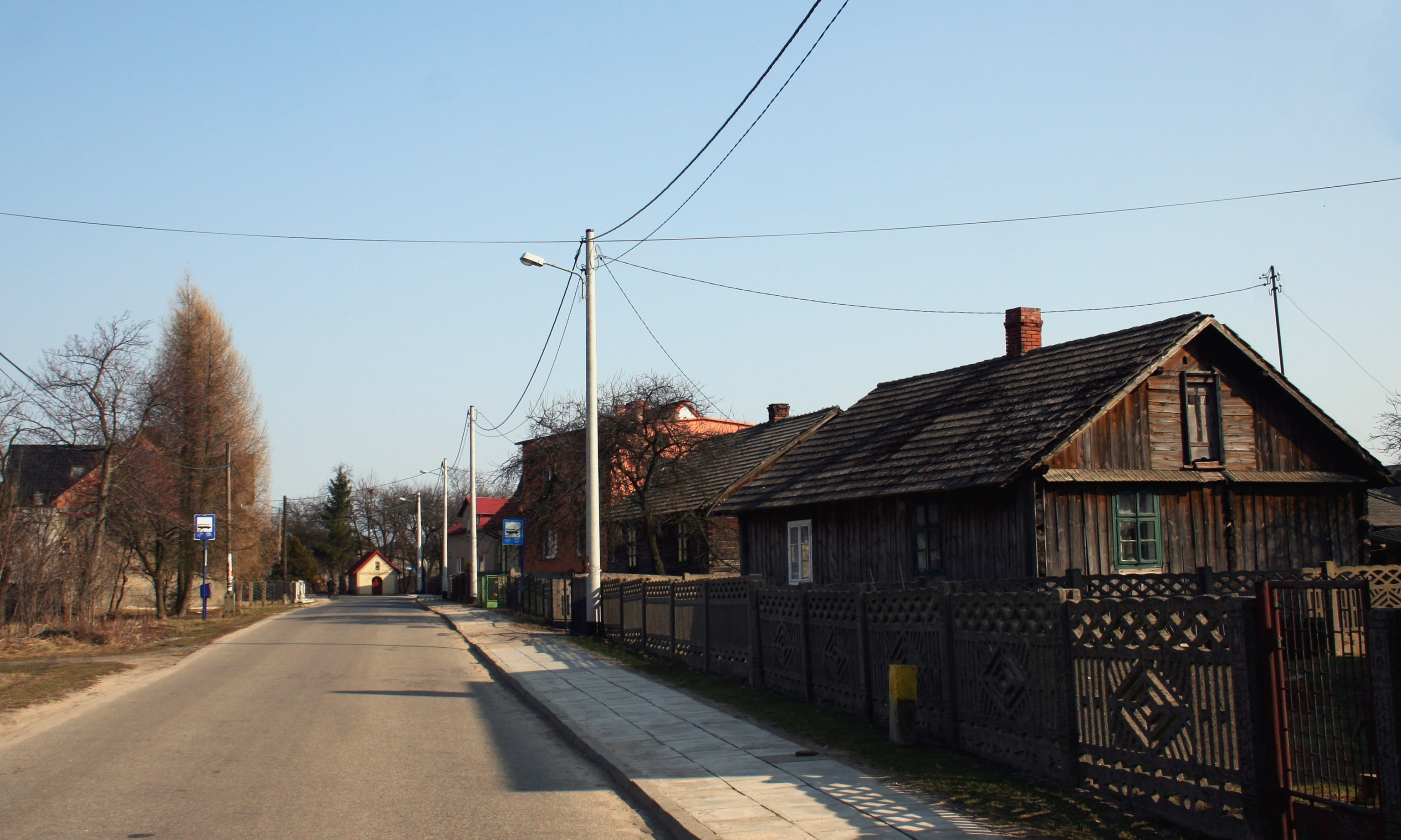 Brudzowice, powiat będziński - fragment wsi